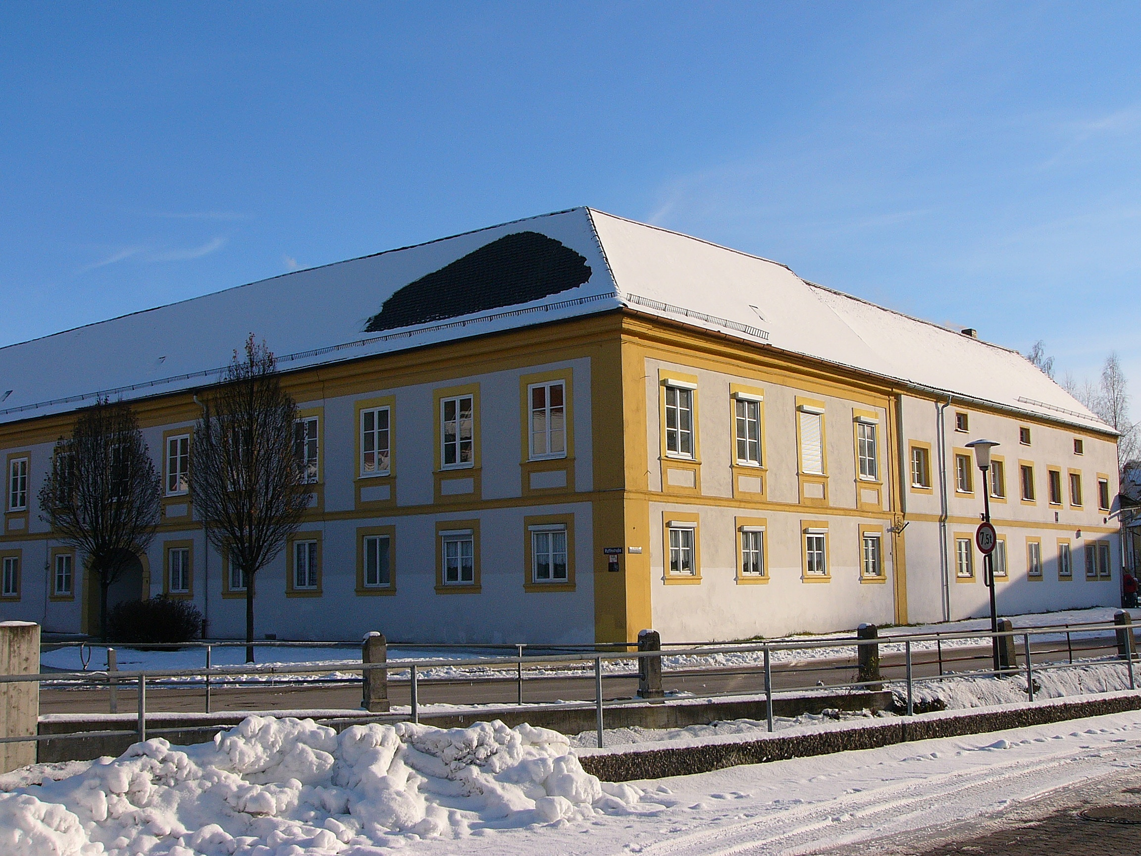 Ehem. Hofmarksschloss Achdorf; zweigeschossige zweiflügelige Anlage von 19 zu 17 Achsen, mit Walmdach, 1. Hälfte 18. Jh.; einen dritten Flügel bilden die Nebengebäude. This is a photograph of an architectural monument.